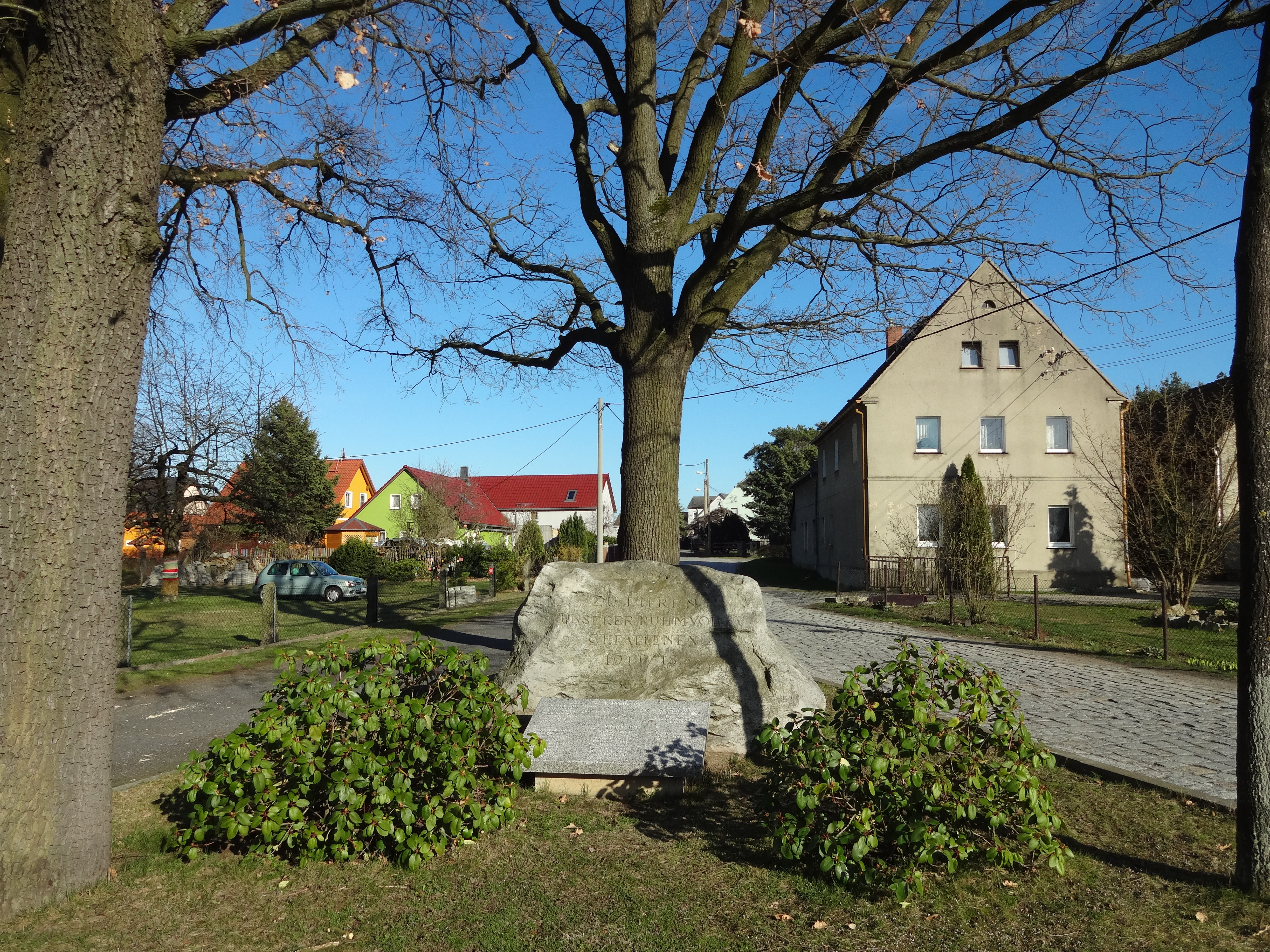 denkmalgeschütztes Kriegerdenkmal in Biehla, Ortsteil von Schönteichen